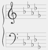 Znaki chromatyczne w gamie b-moll